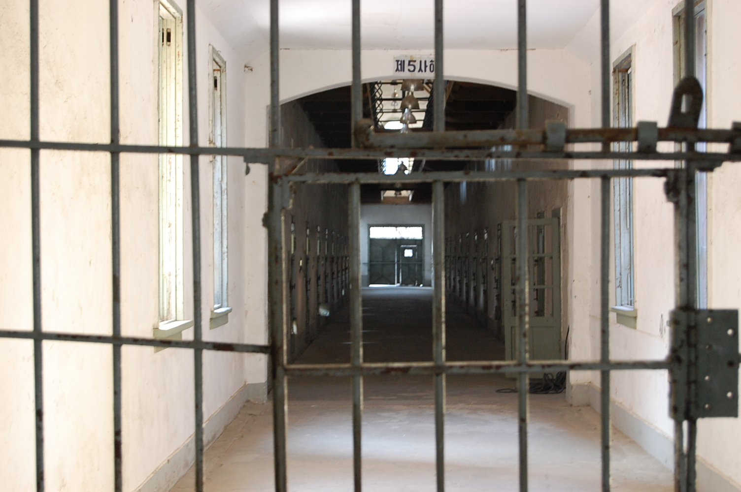 서대문 형무소 옥사 내부